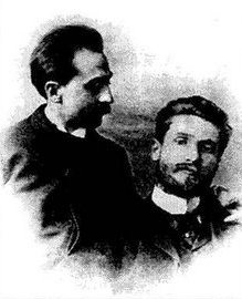 Justh Zsigmond (1863 – 1894) Aggházy Károllyal (1855 – 1918)